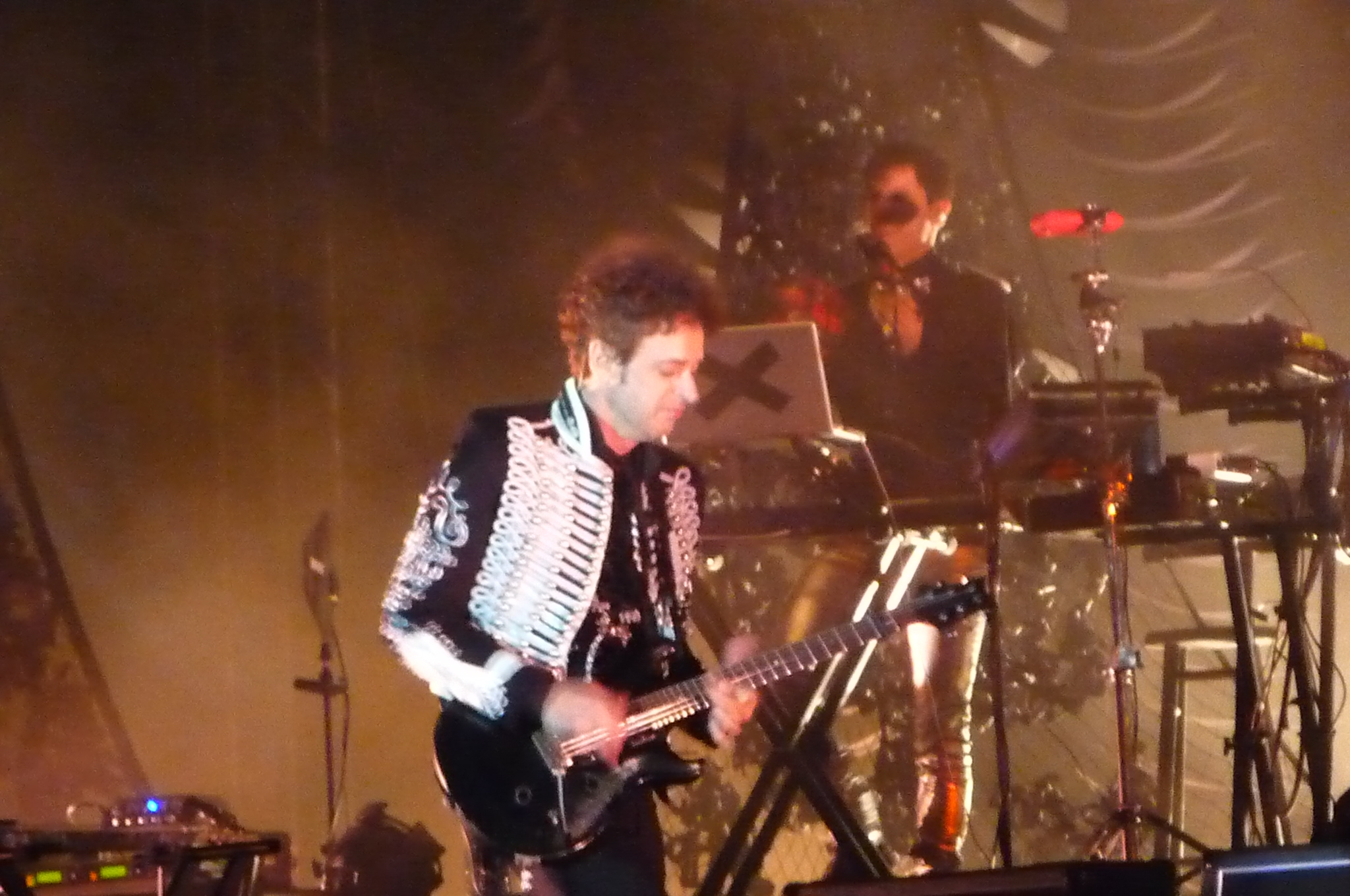 Concierto Gustavo Cerati